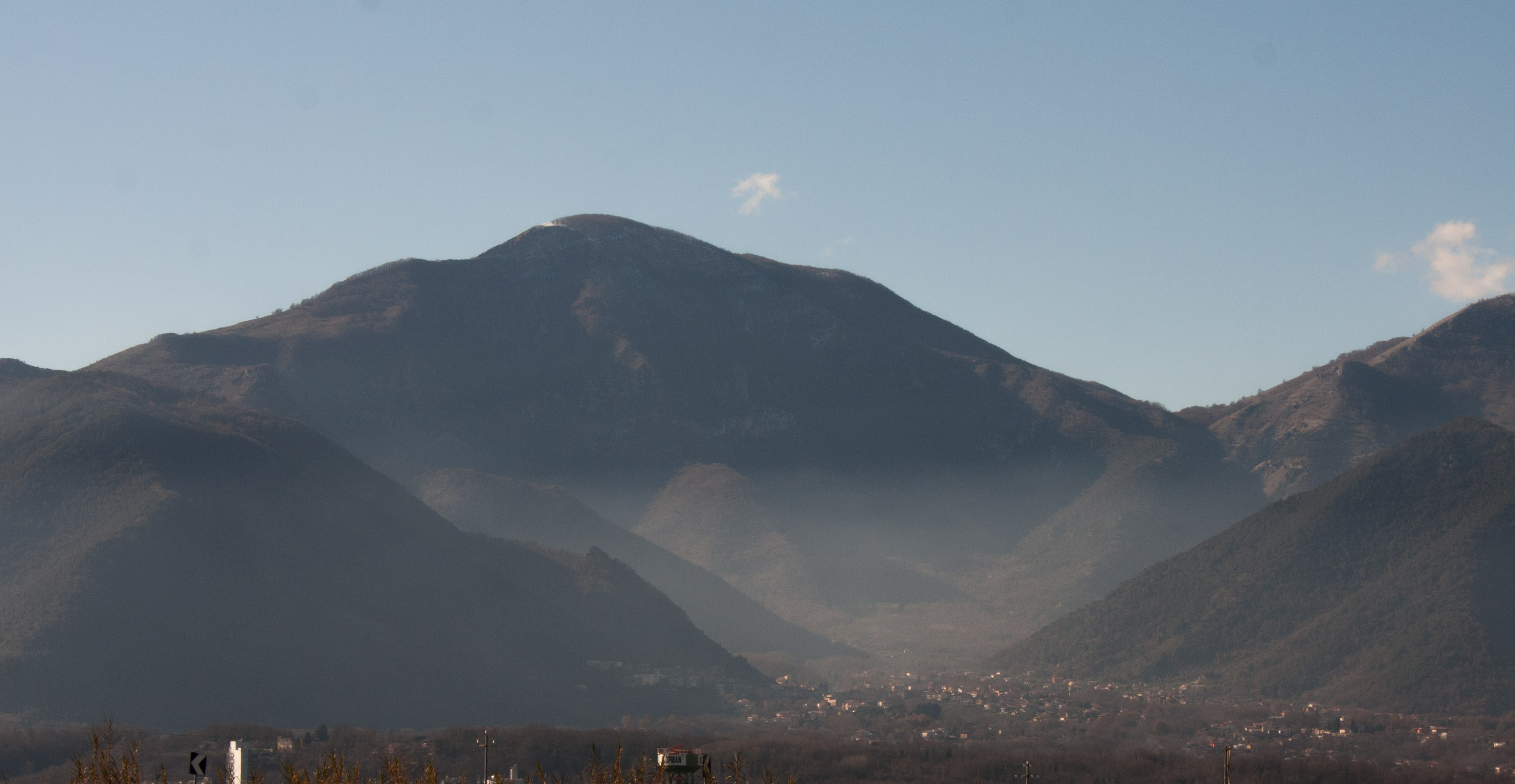 veduta di Monte Gemma sopra Supino